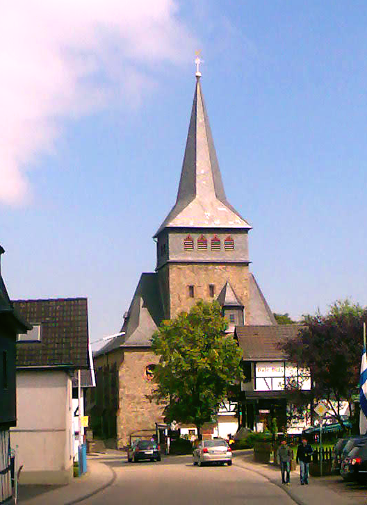 Marmagen - alte Kirchgasse von Westen